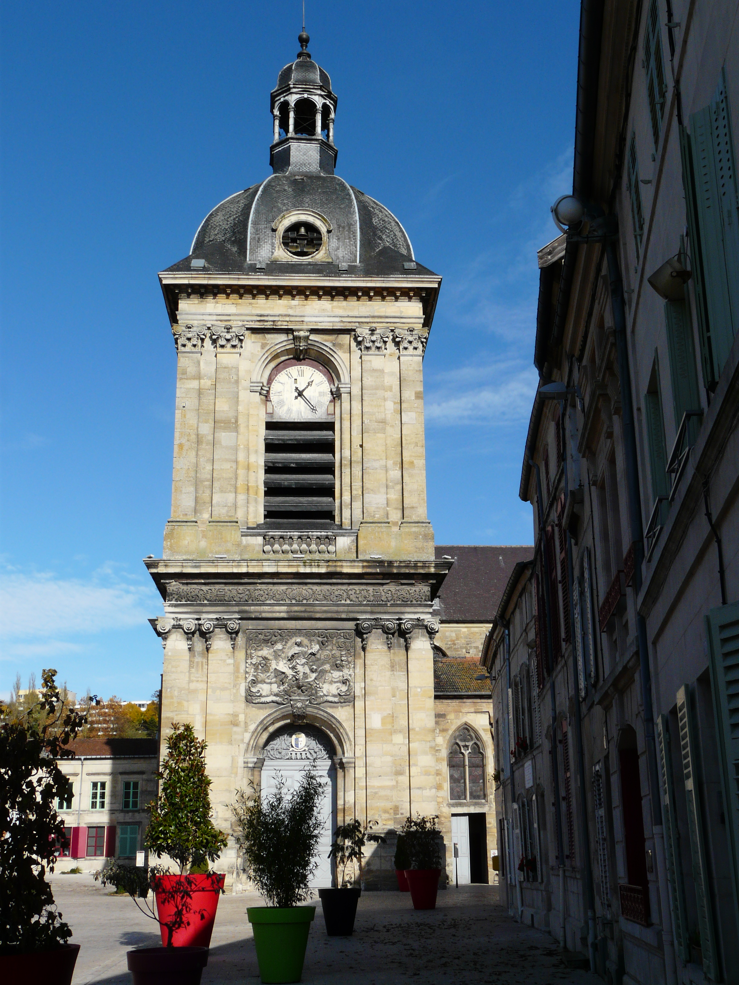 Eglise Notre Dame de Bar-le-Duc